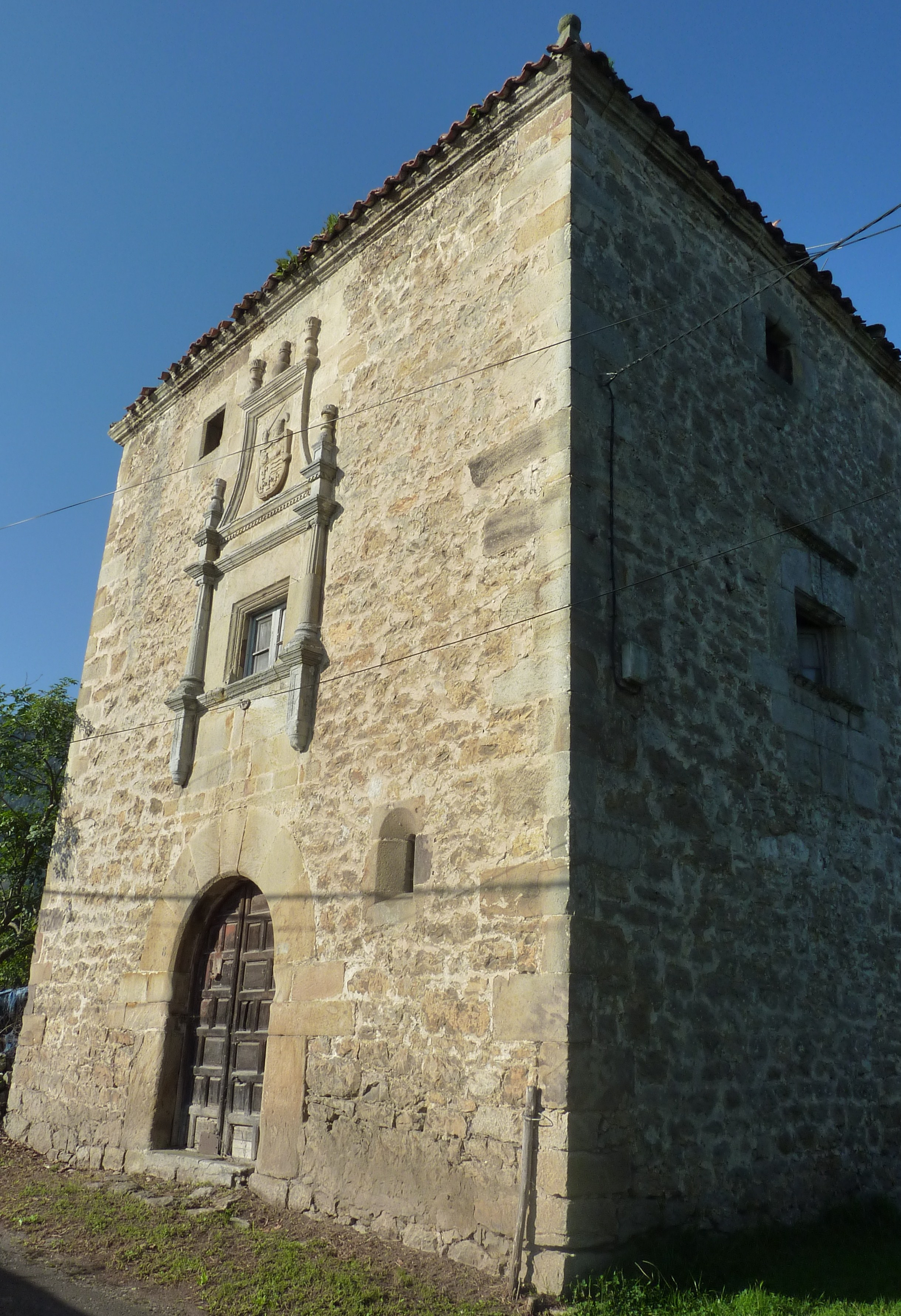 Torre.